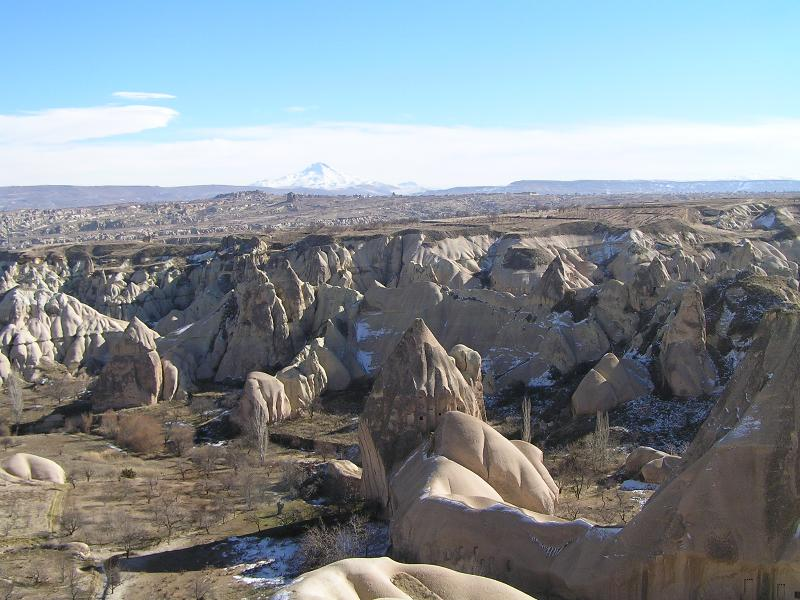 cheminées de fées en Cappadoce